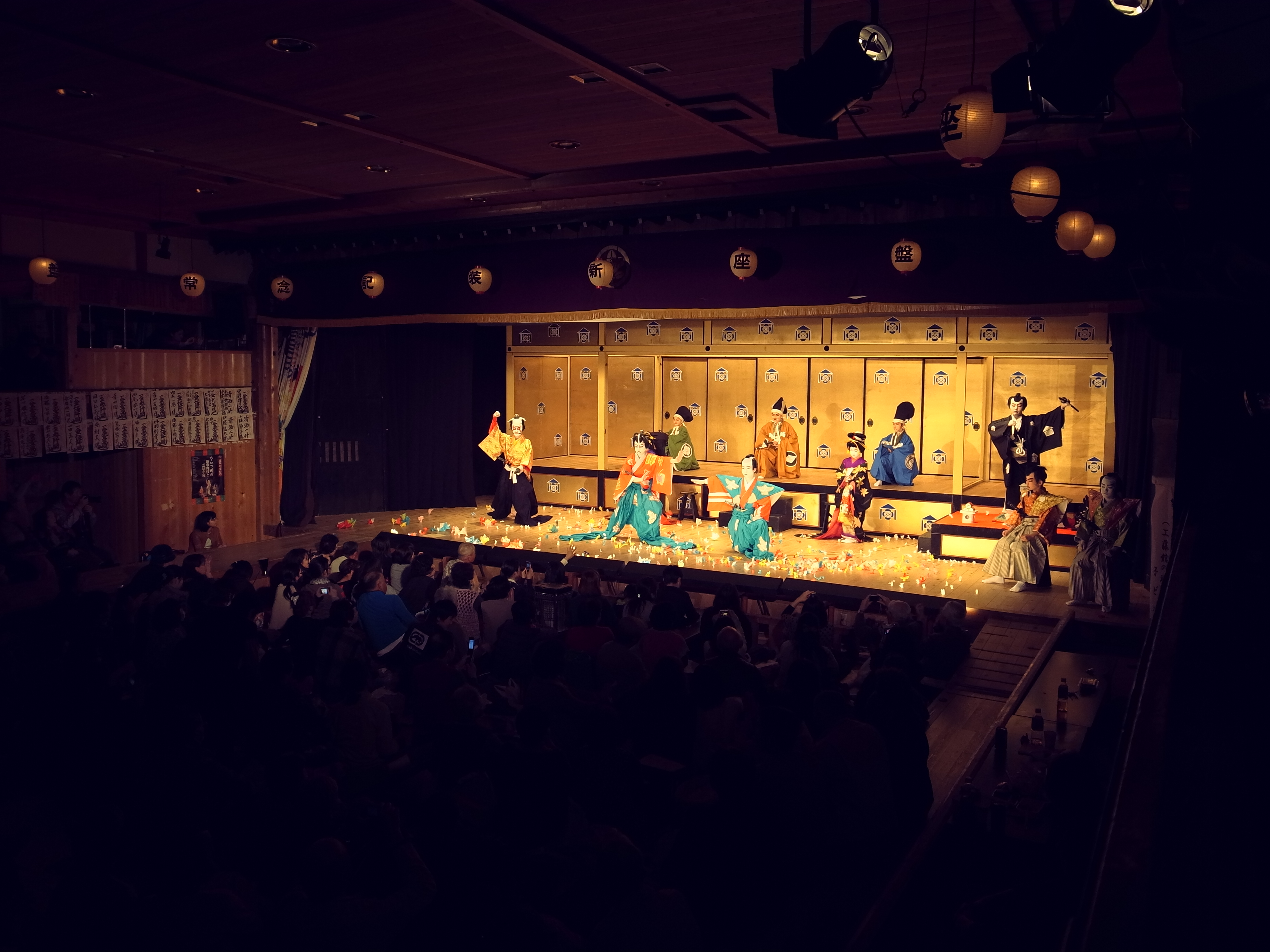 岐阜県中津川市（旧恵那郡福岡町）高山にある常盤座、「第二十回常盤座歌舞伎保存会定期公演」、子ども歌舞伎教室による『寿曽我対面』工藤館の場